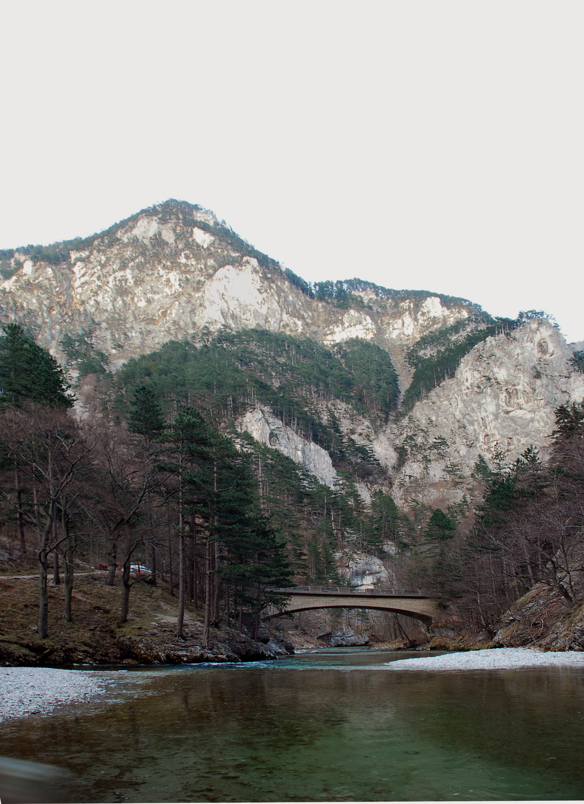 Großofen (Berggipfel mit Namen „Ofen“) im Tal der Schwarza in Niederösterreich zwischen Rax und Schneeberg (Höllental) nördlich der ersten Schwarzabrücke (Rechenbrücke)